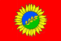 Флаг Прикубанского сельского поселения, Краснодарский край, Россия.